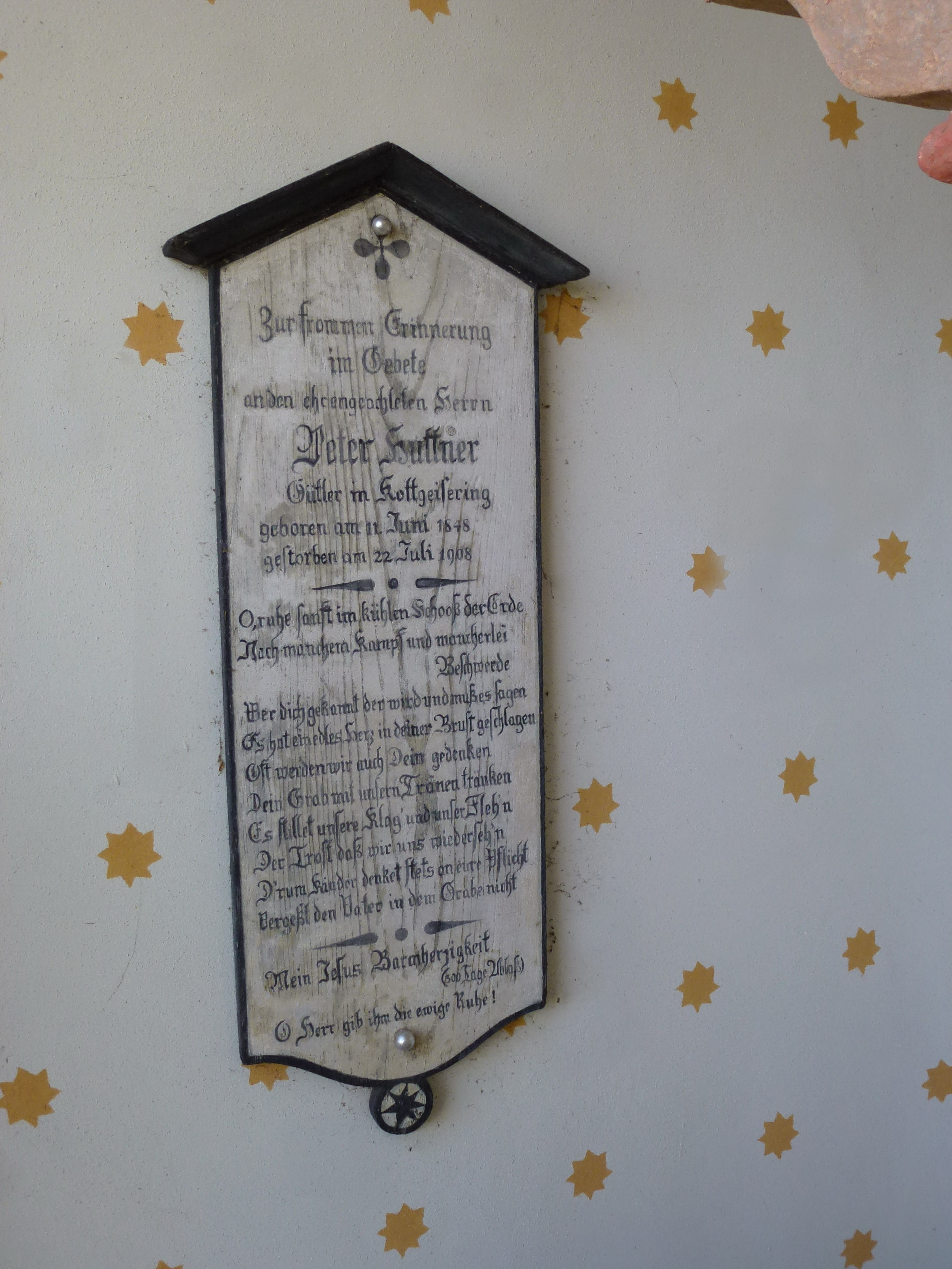 Kottgeisering, Feld-Kapelle St. Florian, Detail: Totenbrett für den Stifter der Kapelle an der Innenseite der Südwand mit dem Text: Zur frommen Erinnerung im Gebete an den ehrengeachteten Herrn Peter Huttner, Gütler in Kottgeisering geboren am 11.Juni 1848 gestorben am 22.Juli 1908 O ruhe sanft im kühlen Schooß der Erde Nach manchem Kampf und mancherlei Beschwerde. Wer dich gekannt, der wird und muß es sagen Es hat ein edles Herz in deiner Brust geschlagen, Oft werden wir auch Dein gedenken Dein Grab mit unsern Tränen tränken. Es stillet unsere Klag' und unser Fleh'n Der Trost, daß wir uns wiederseh'n. D'rum Kinder denket stets an eure Pflicht Vergeßt den Vater in dem Grabe nicht. Mein Jesus Barmherzigkeit (300 Tage Ablaß) O Herr gib ihm die ewige Ruhe!